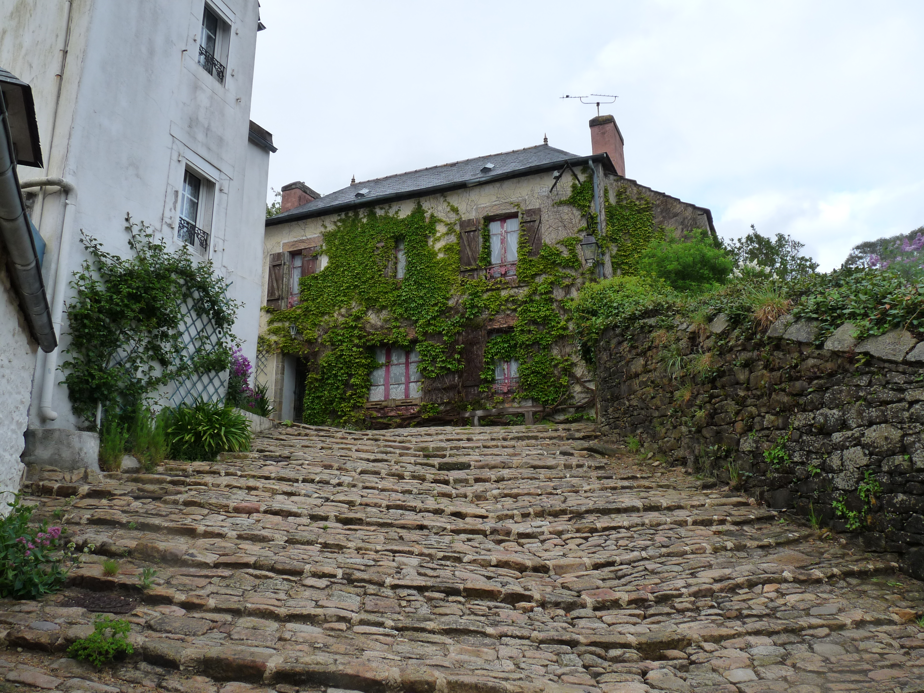 Grande Rue Chère à Pont-Croix (Finistère)